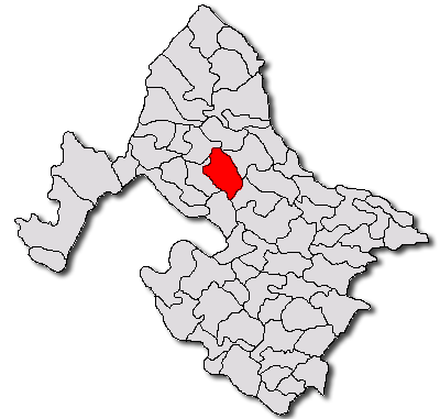 Categorie:Hărţi ale judeţului Mehedinţi